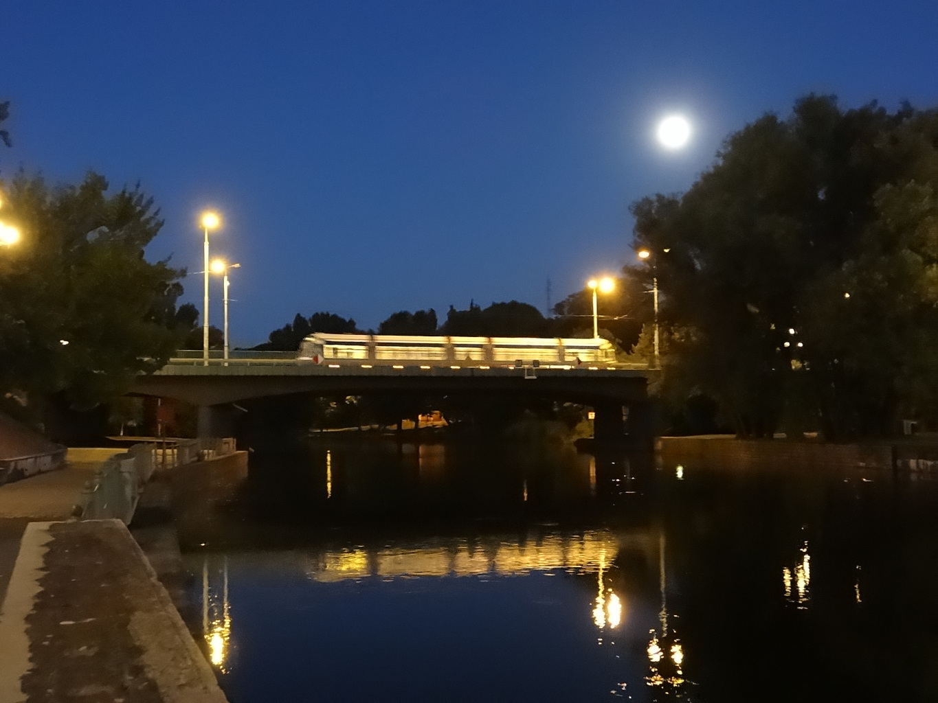 Most Bernardyński w Bydgoszczy